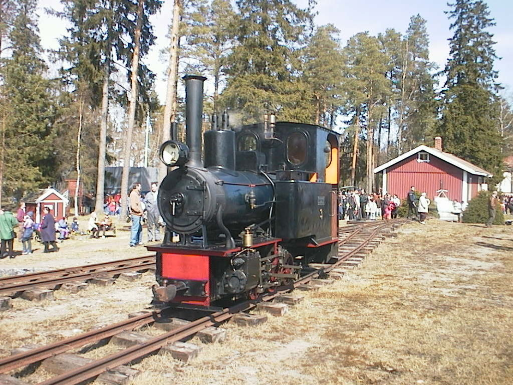 Ojakkalan–Olkkalan rautatien veturi numero 3 Kovjoella